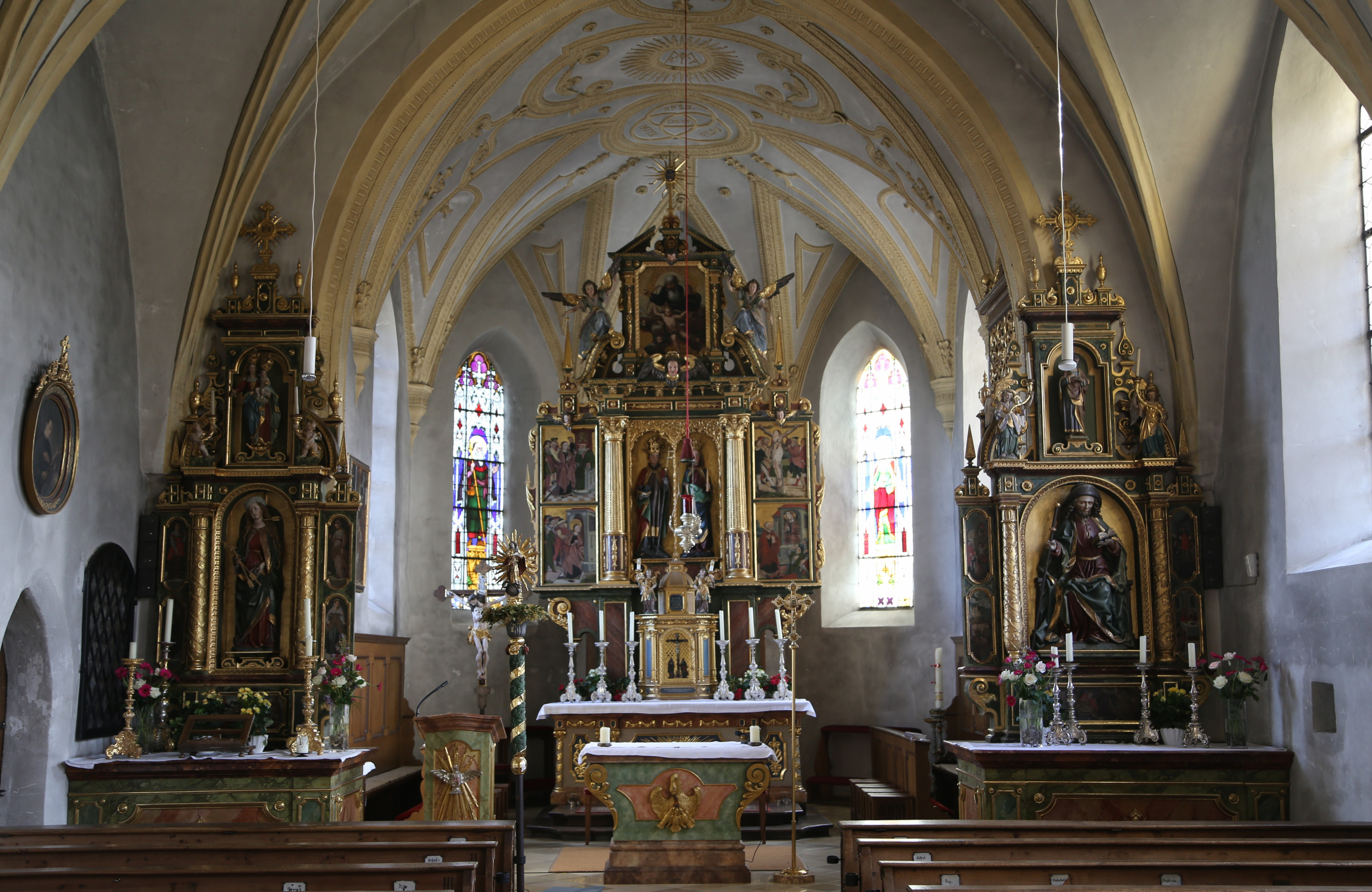 Katholische Pfarrkirche St. Agatha, Agatharied, Hausham; Spätgotischer Saalbau mit polygonalem Chor und Nordturm, 1505, um 1670 westlich erweitert und Chor barockisiert; mit Ausstattung